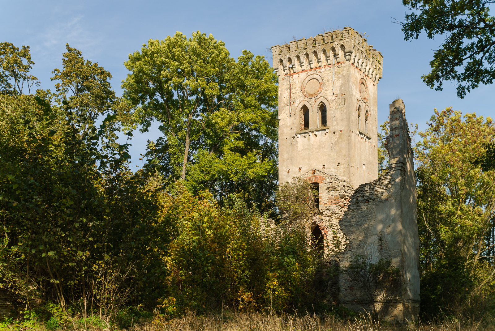 Lehtse mõisa peahoone varemed